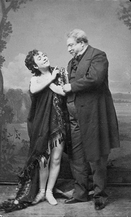 Alphonse Liébert.- Alexandre Dumas père et Ada Menken debout, à Paris, vers 1867, Tirage photographique conservé au musée Alexandre Dumas deVillers-Cotterêts. Joconde Portail des collections des musées de France.